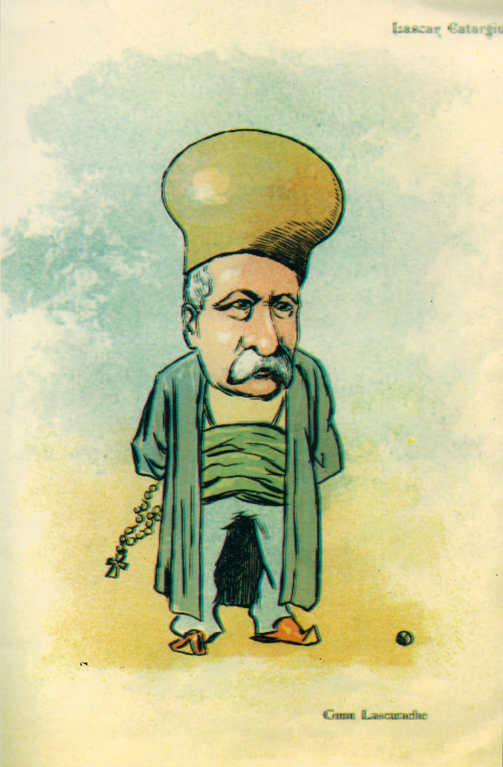 Lascăr Catargiu (caricatură din Albumul Contemporani). Conu Lascarache